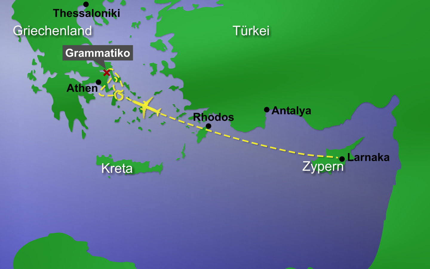 Karte des Helios Airways Fluges 522. Helios Airways Flug 522 stürzte nahe der Stadt Grammtiko in Griechenland, etwa 10 km entfernt vom Athener Flughafen mit 121 Passagieren an Bord ab. Die Karte zeigt den original Flugverlauf am Zielgebiet. Der Autopilot steuerte das Flugzeug zunächst in Richtung Flughafen Athen, flog dann Richtung Süden und zog längere Zeit Schleifen über der Ägais. Danach flog das Flugzeug wieder Richtung Flughafen Athen, bis es nahe Grammatiko abstürzte. Als Quelle hierzu dienten die Radarplots [1] zum Flug. Im Startgebiet kann die Zeichnung jedoch ungenau sein, da hierzu (bisher) noch kein Radarplot verfügbar ist.